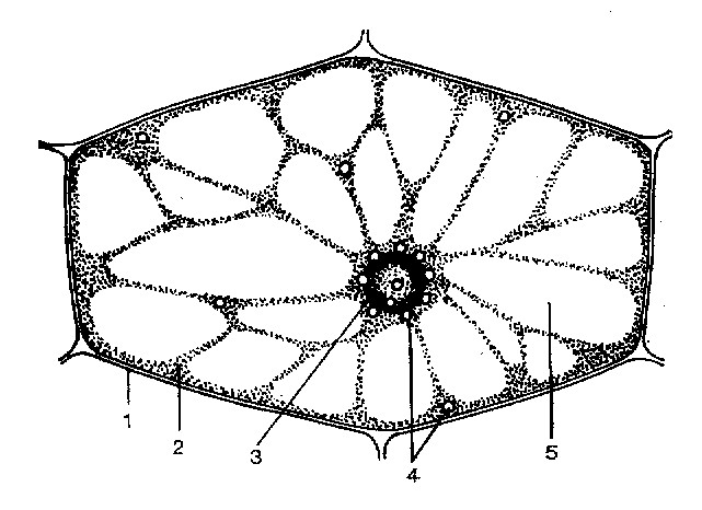 Komórka liścia trzykrotki i zawarte w niej leukoplasty.